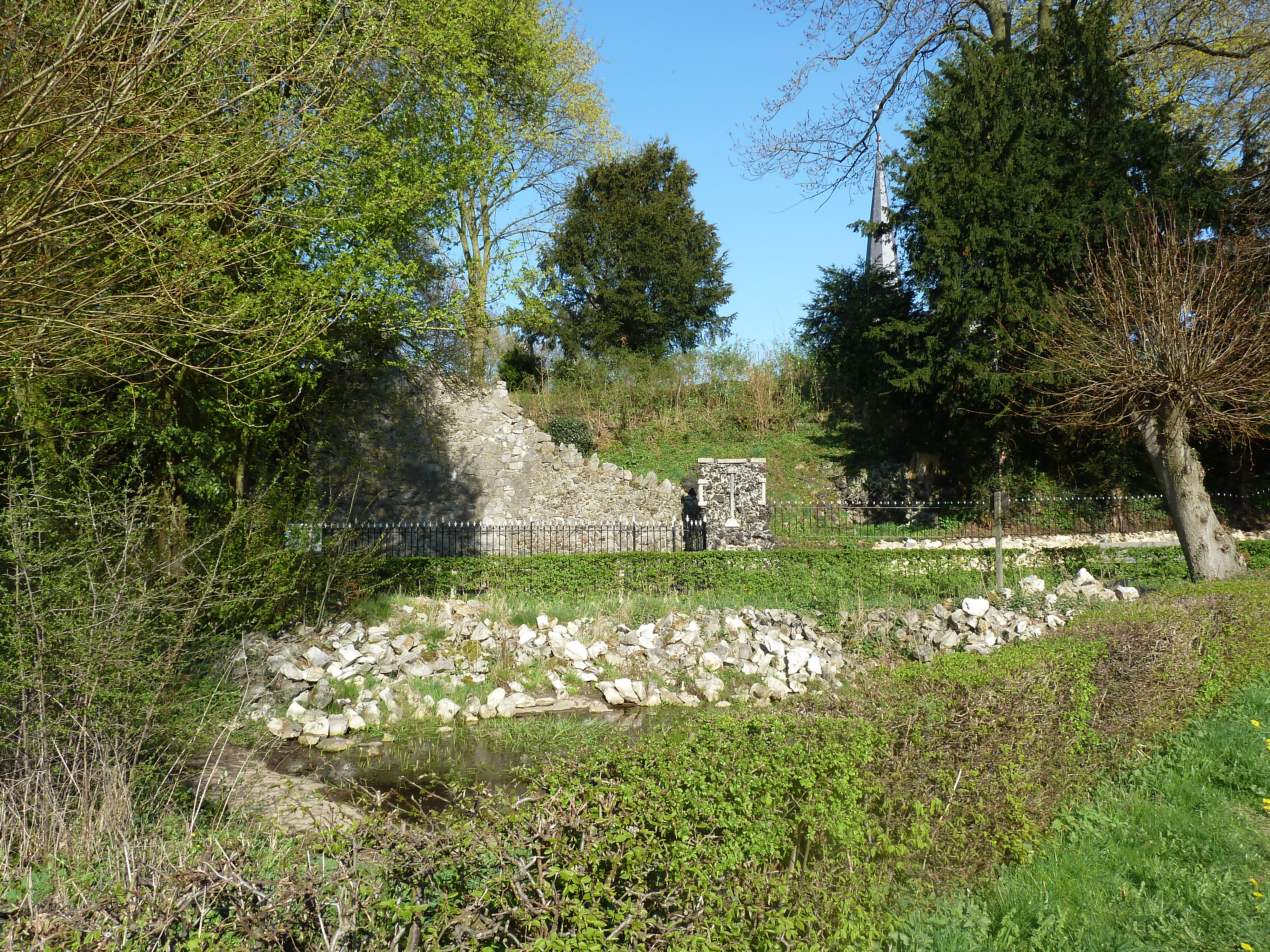 Lambertusbron en Lourdes- en Lambertusgrot, Holset, Limburg, Nederland